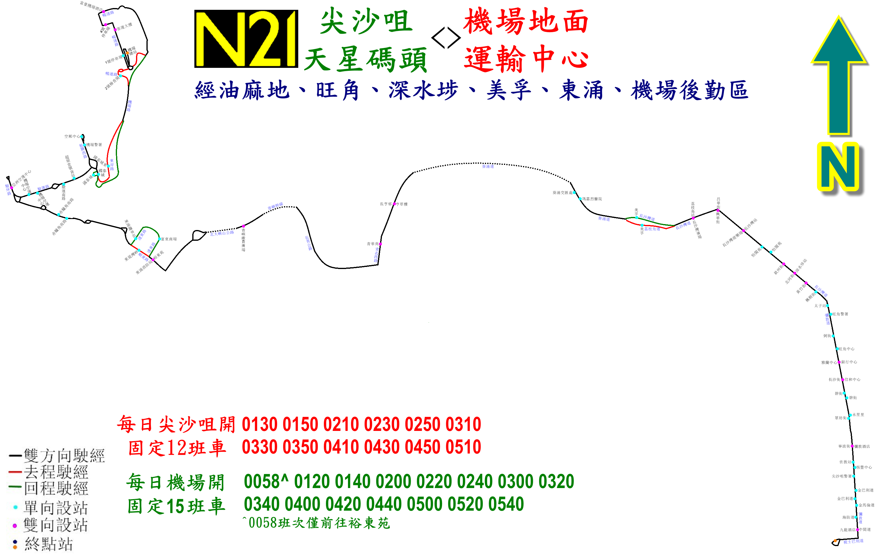 中文（香港）: 城巴N21線的走線圖